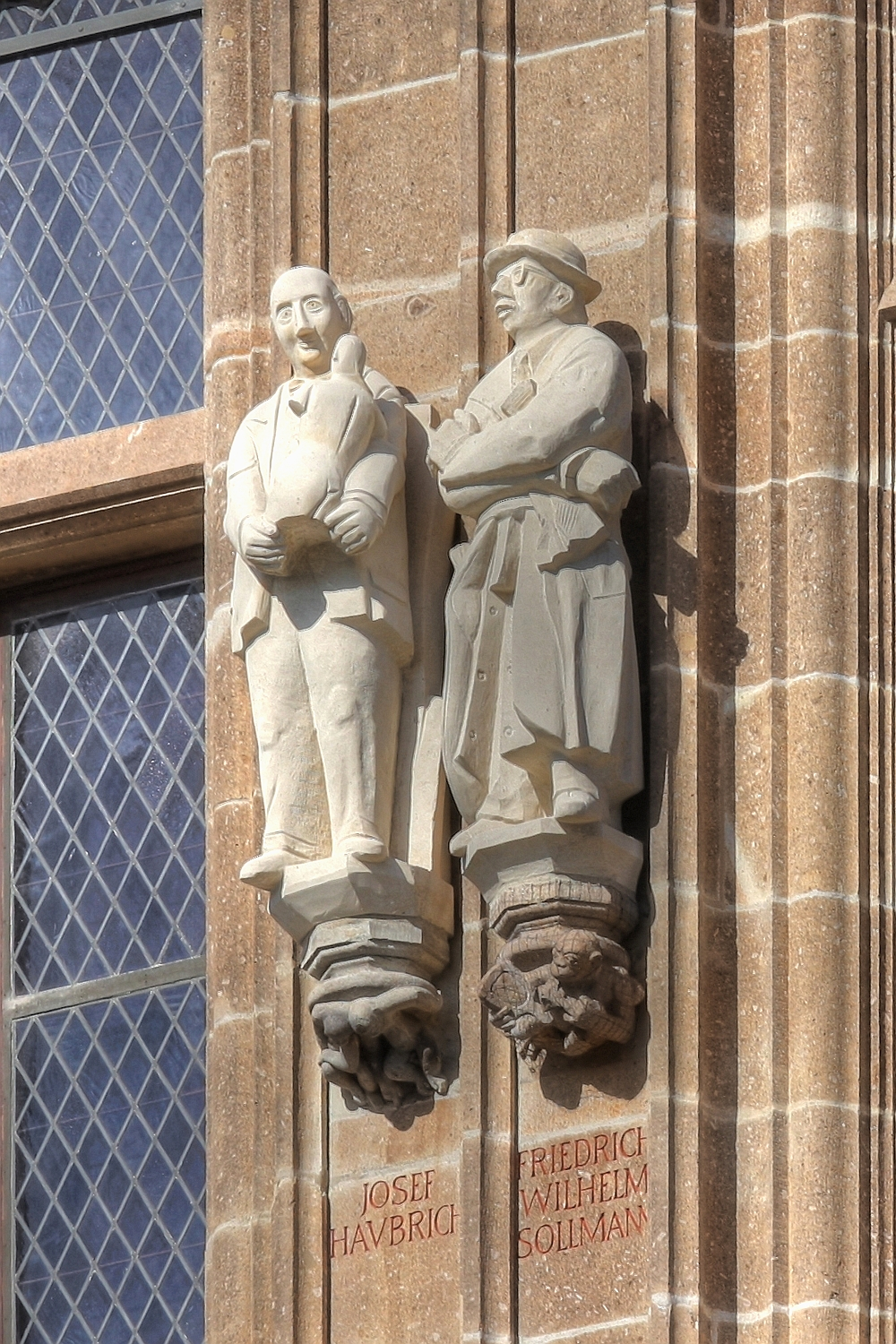 Rathausturm Köln mit den Figuren des Josef Haubrich und Friedrich Wilhelm Sollmann Details zu der Statue: Bildhauer der Haubrich-Statue: Hans Karl Burgeff Bildhauer der Sollmann-Statue: Hans Karl Burgeff Details zu der Konsole: Thema der Konsole unter der Haubrich-Statue: „Zwei Affen“. Bildhauer: Herbert Rausch Thema der Konsole unter der Sollmann-Statue: „Lackaffe“. Bildhauer: Herbert Rausch